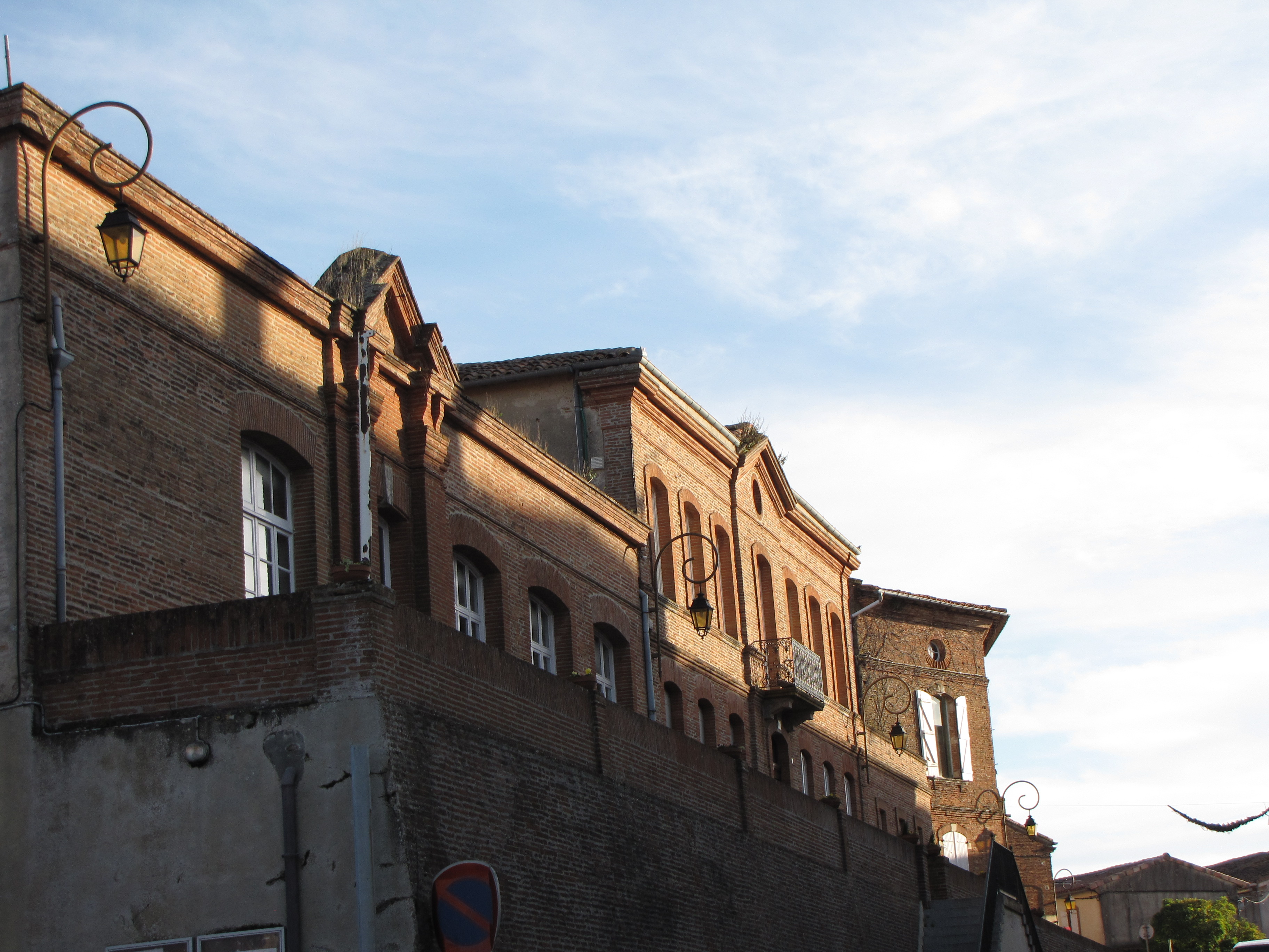 Mairie de Nailloux